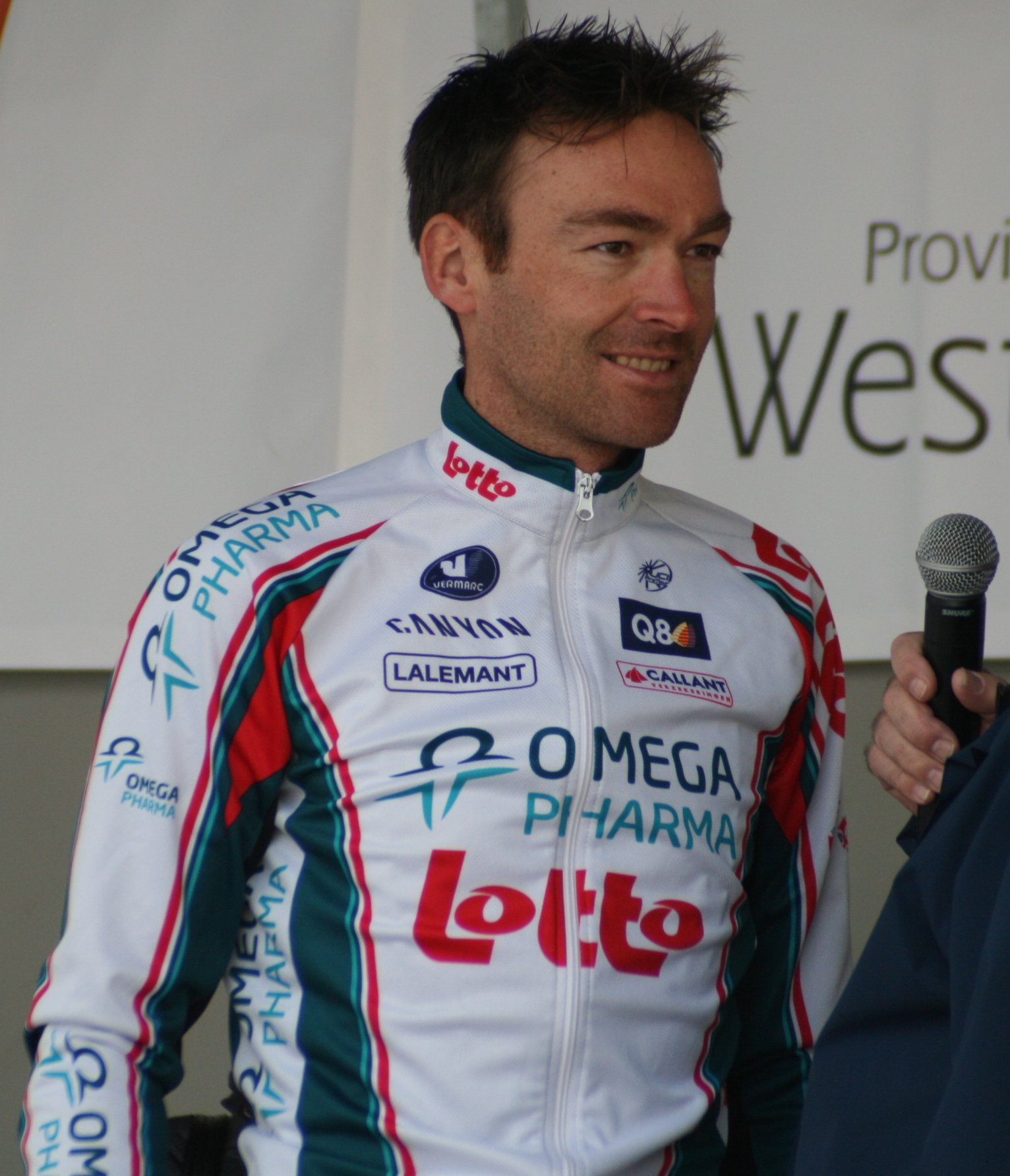 Mario Aerts lors des Trois jours de Flandre occidentale 2010